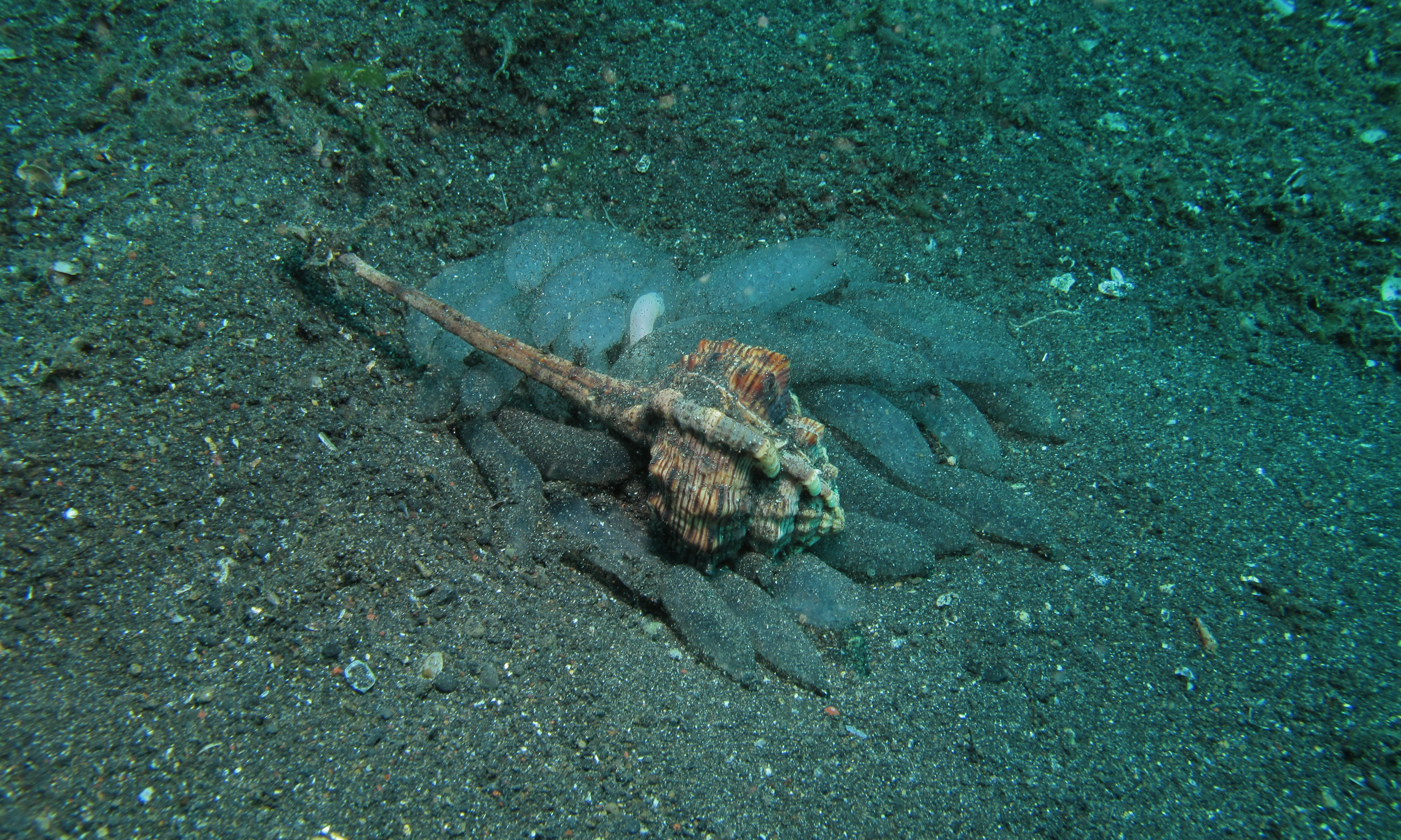 Hairball 1, Lembeh Strait, Sulawesi, INDONESIA